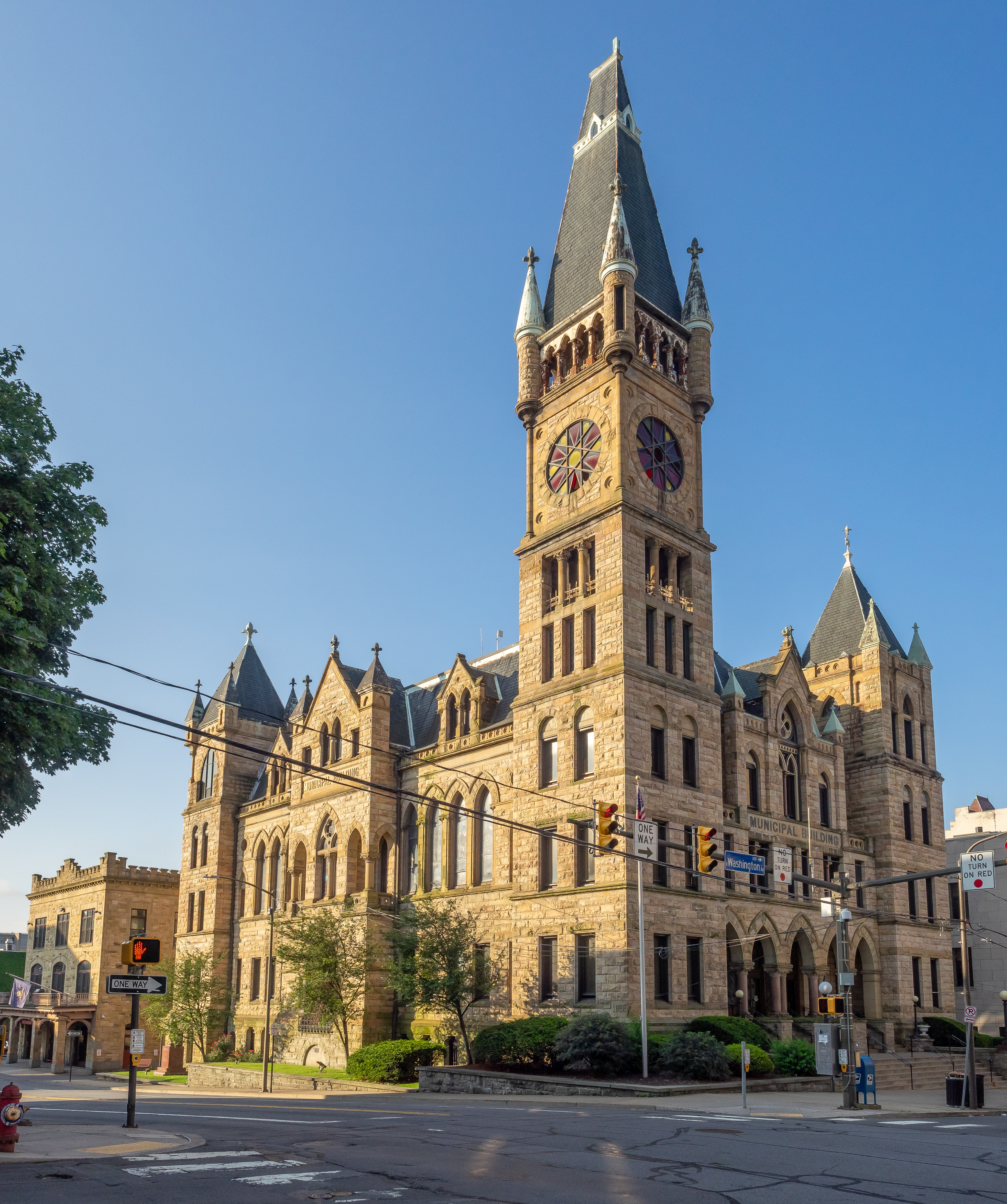 Scranton, PA